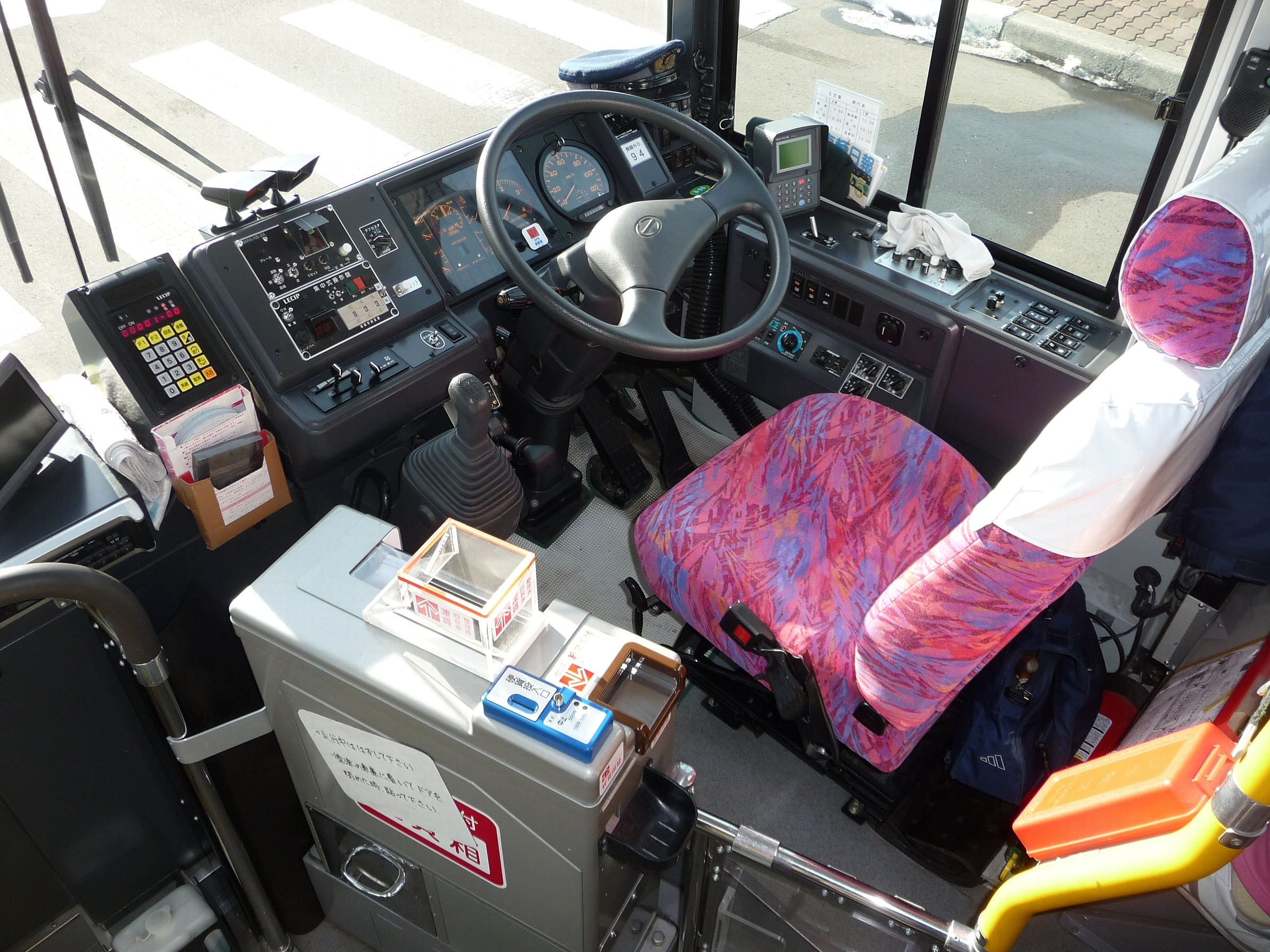 阿寒バス 釧路200か225の運転席 日野レインボーHR PB-HR7JHAE 2009年1月9日に、北海道標茶町標茶バスターミナルで撮影